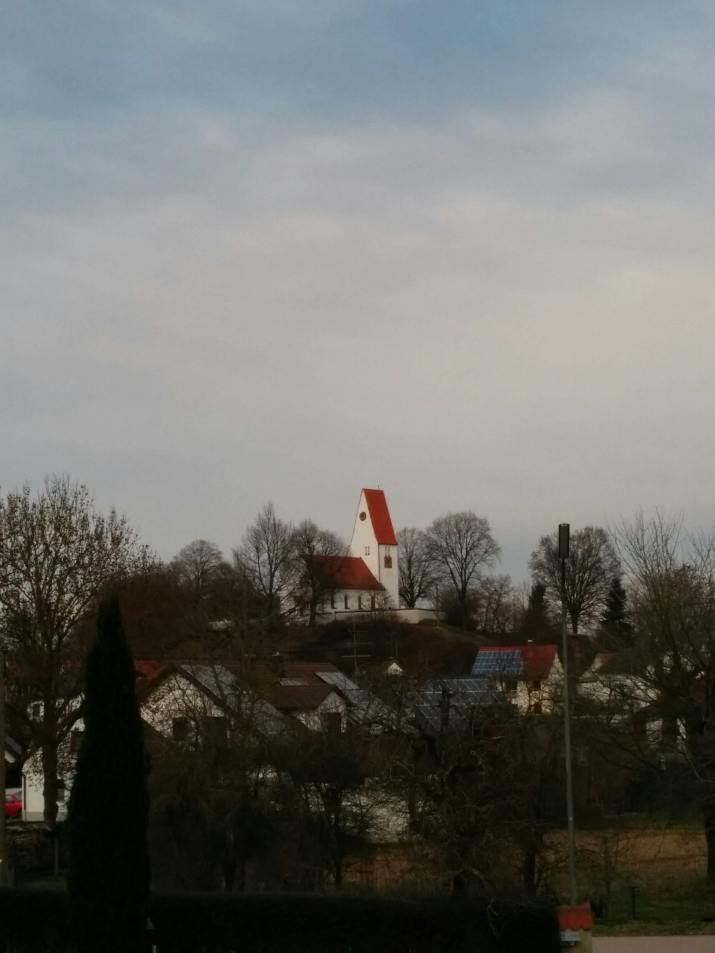 Ansicht der Pfarrkirche Sankt Martin in der Gemeinde Ambach (Ehekirchen)